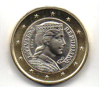 1 euro 2014 letonia